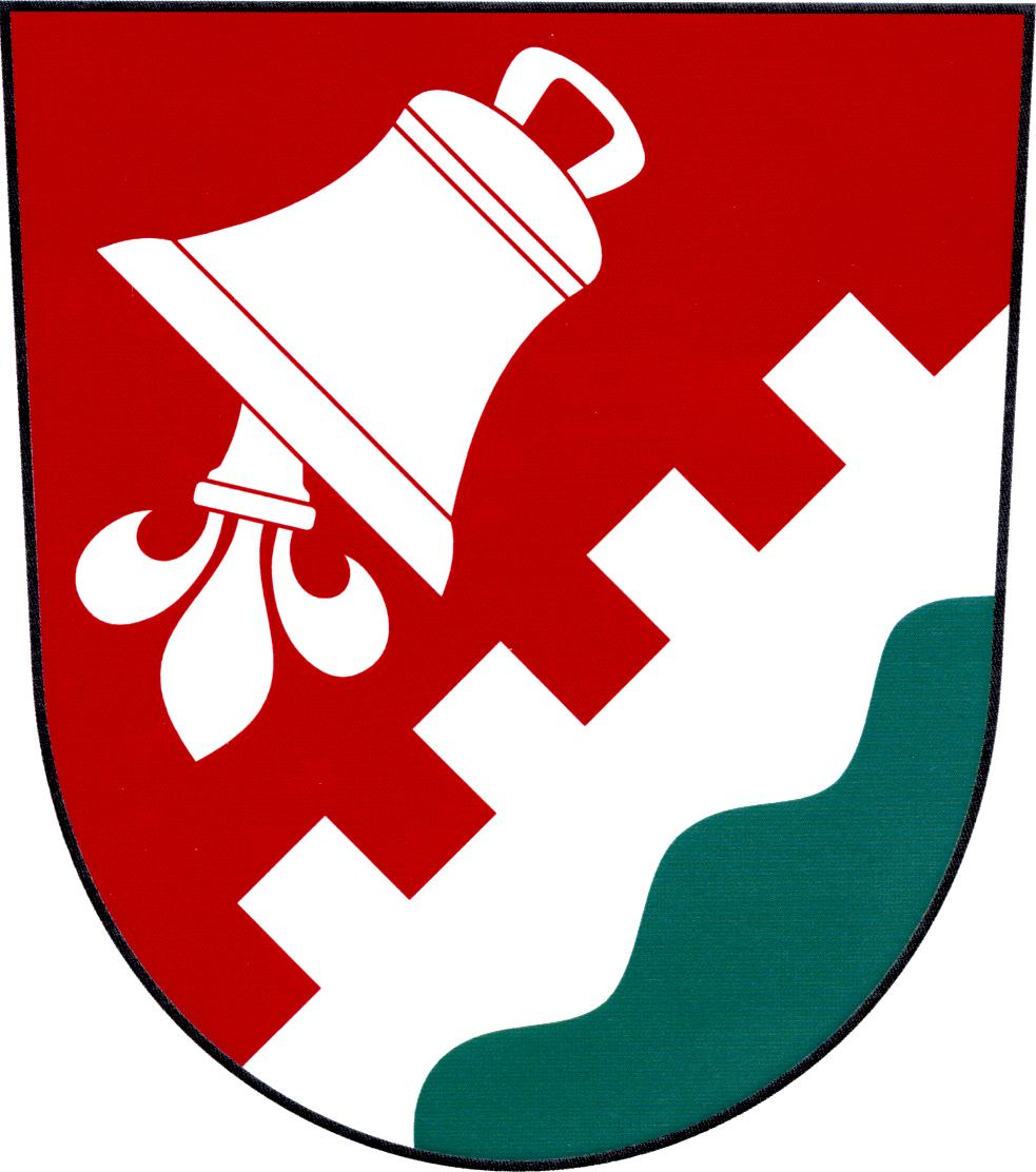 Znak obce Chudíř